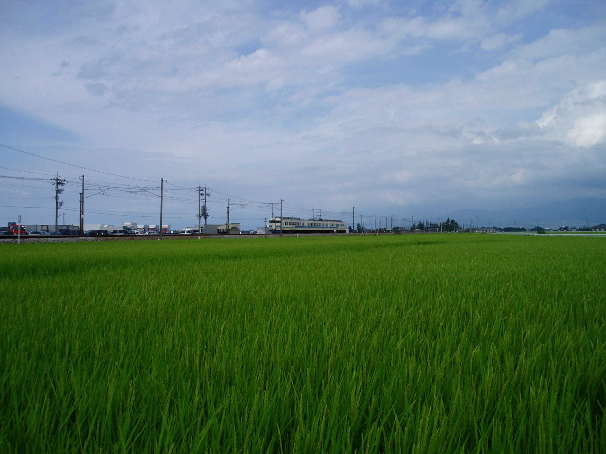 北陸本線413系電車